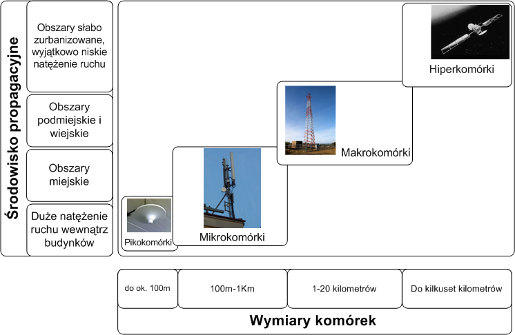 Ilustracja przedstawia porównanie rodzajów komórek zdefiniowanych dla sieci UMTS